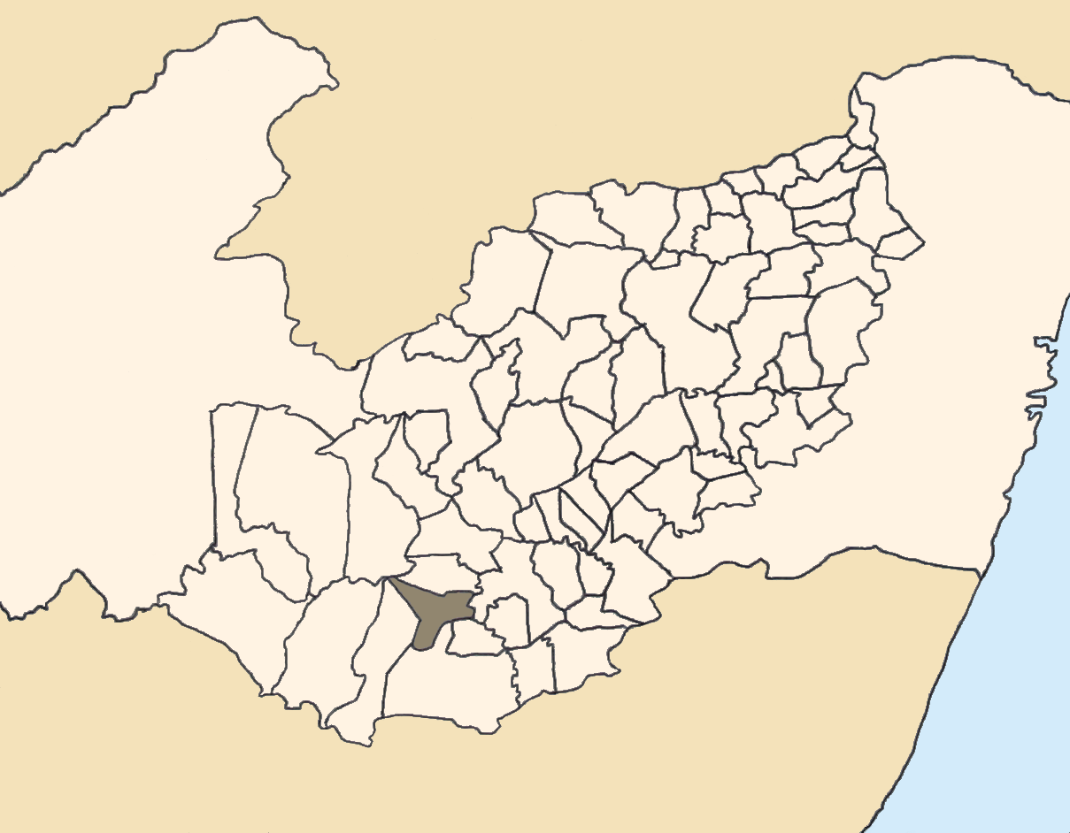 Mapa da mesorregião Agreste de Pernambuco (Brasil) subdivida em municípios. Em destaque, o município de Saloá. Map of the brazilian state of Pernambuco (mesorregião Agreste) showing the city of Saloá. Imagem tratada com o GIMP. Image made with GIMP.